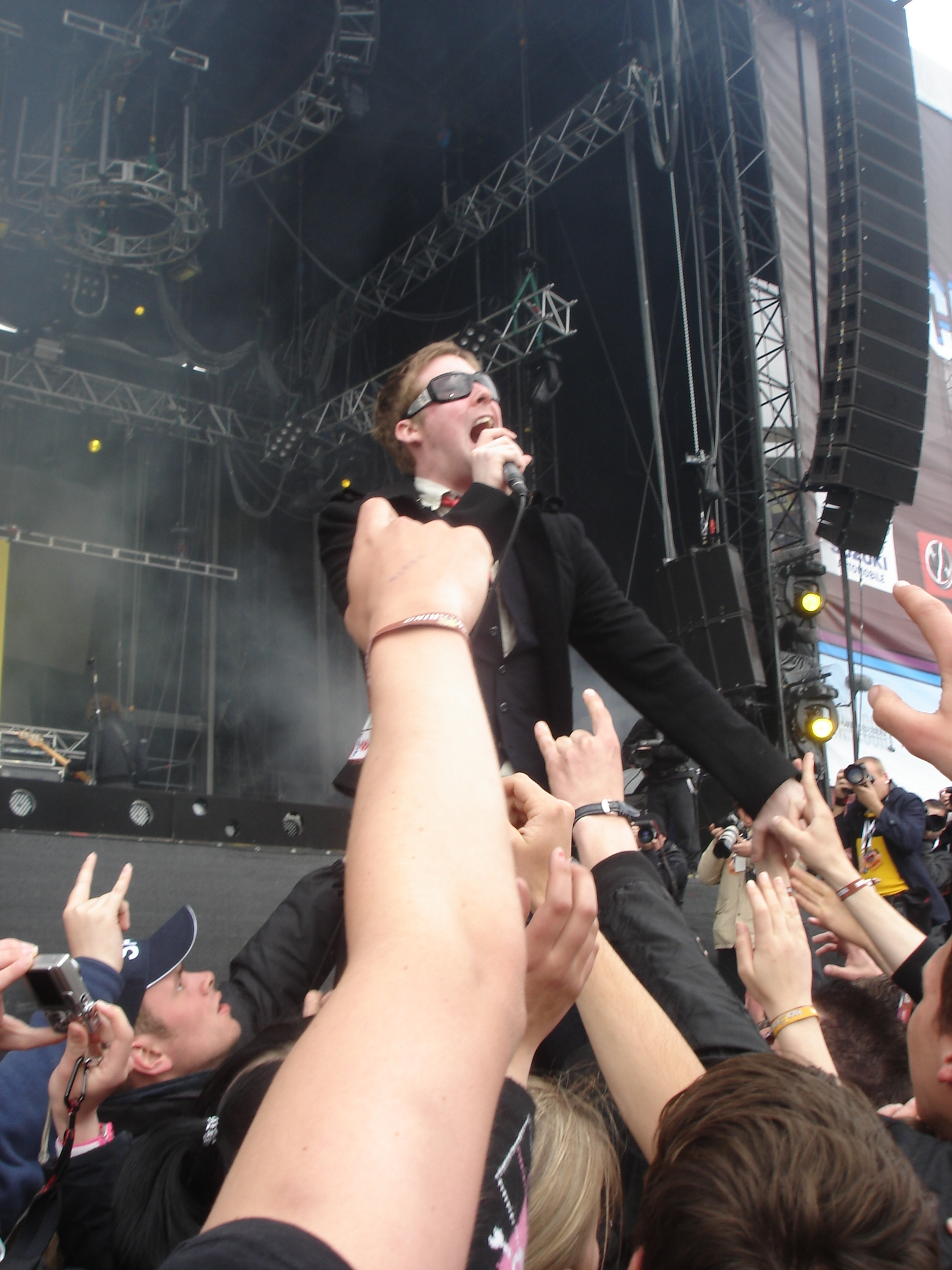 Ricky Wilson von Kaiser Chiefs bei Rock am Ring 2006 auf der Censterstage